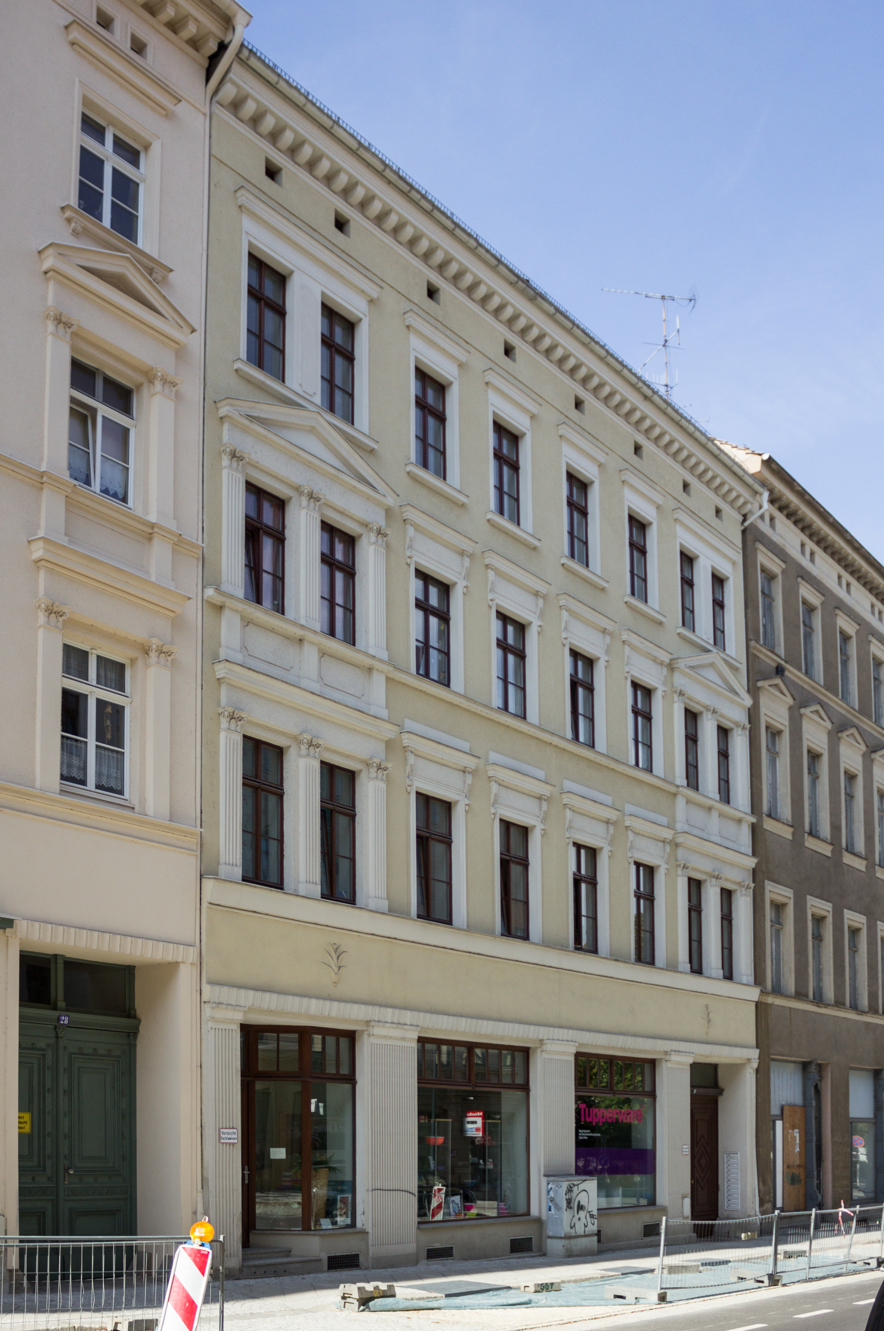 Jakobstraße 29, Görlitz